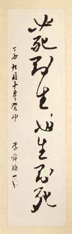 必死卽生, 必生卽死 필사즉생, 필생즉사